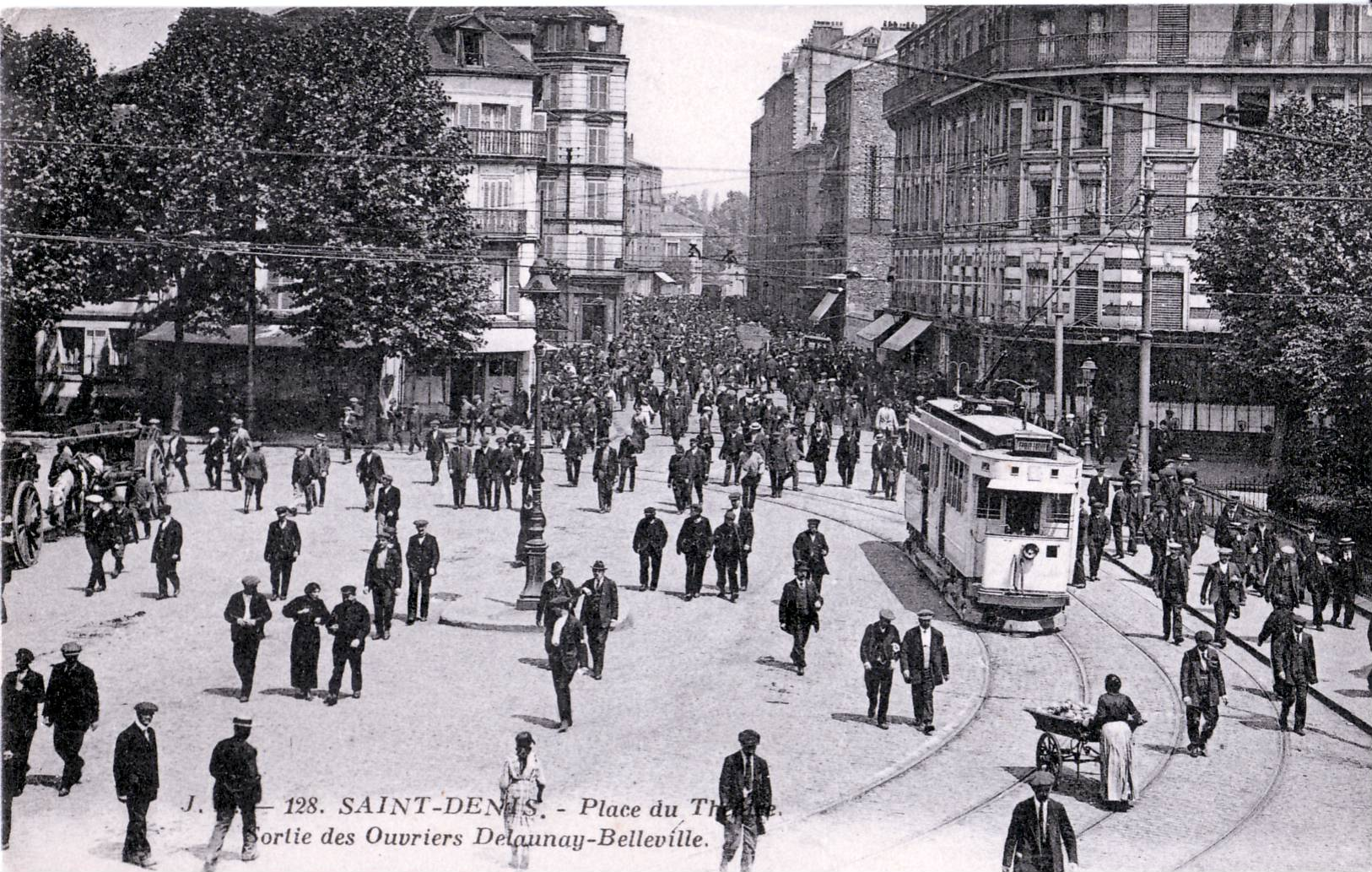 carte postale ancienne éditée par JF N°128SAINT-DENIS : Place du Théatre - Sortie des ouvriers Delaunay-BellevilleVue d'une motrice du Tramway Enghien - Trinité